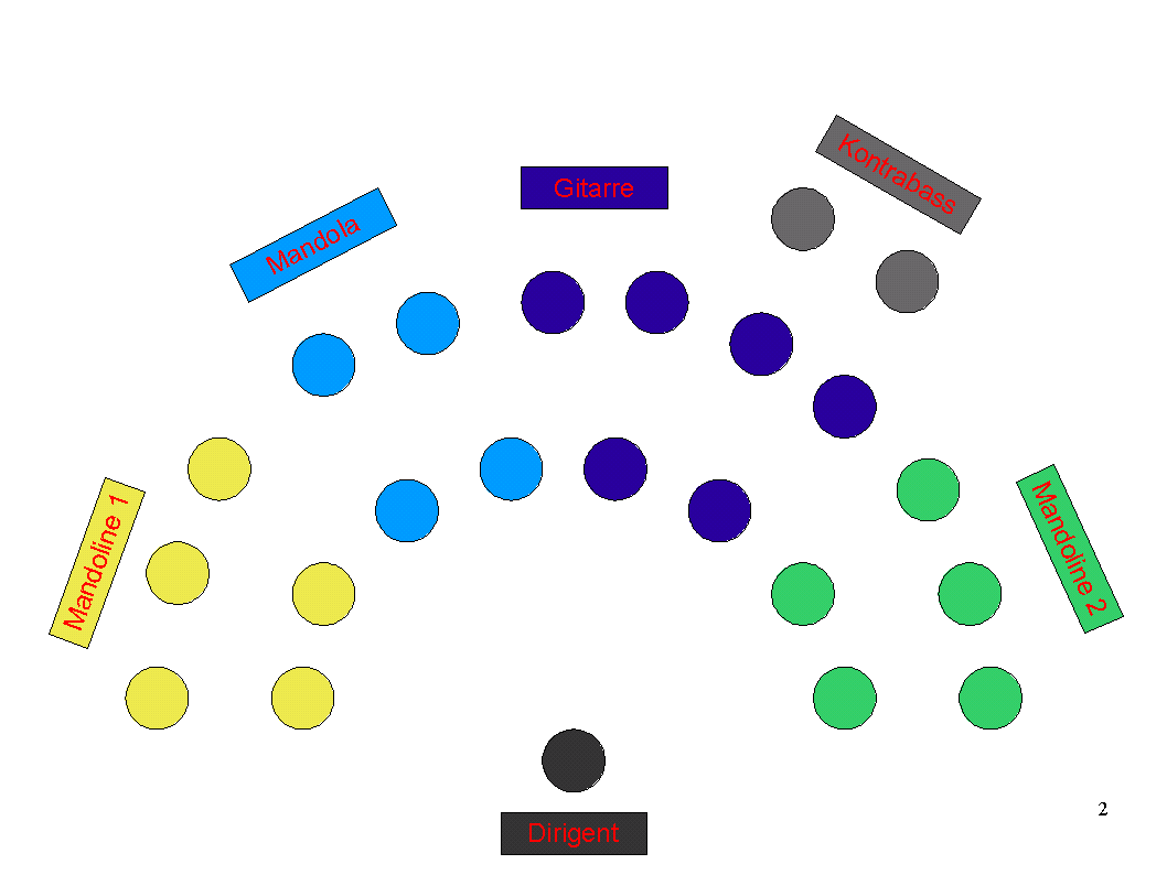 In der Grafik wird die eine alternative Sitzordnung eines Zupforchesters auf der Bühne dargestellt. Diese Sitzordnung wird bei Werken eingenommen, in denen die beiden Mandolinenstimmen gleichberechtigt im Dialog stehen. Die Anzahl der Spieler pro Stimme ist dabei schematisch angenommen und variiert von Orchester zu Orchester